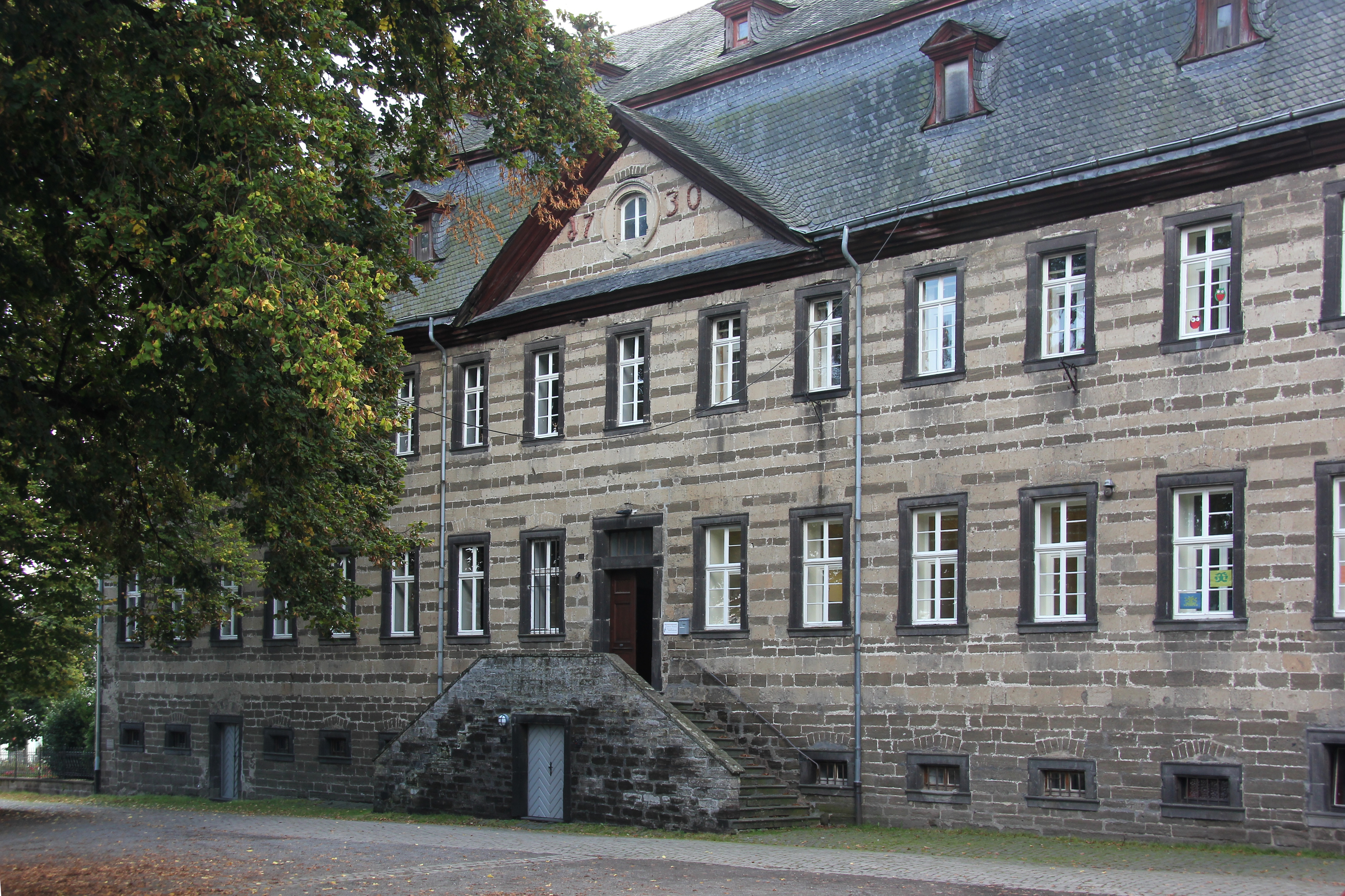 Nordseite des Propsteigebäudes in Wehr (Eifel); 1730 errichtet